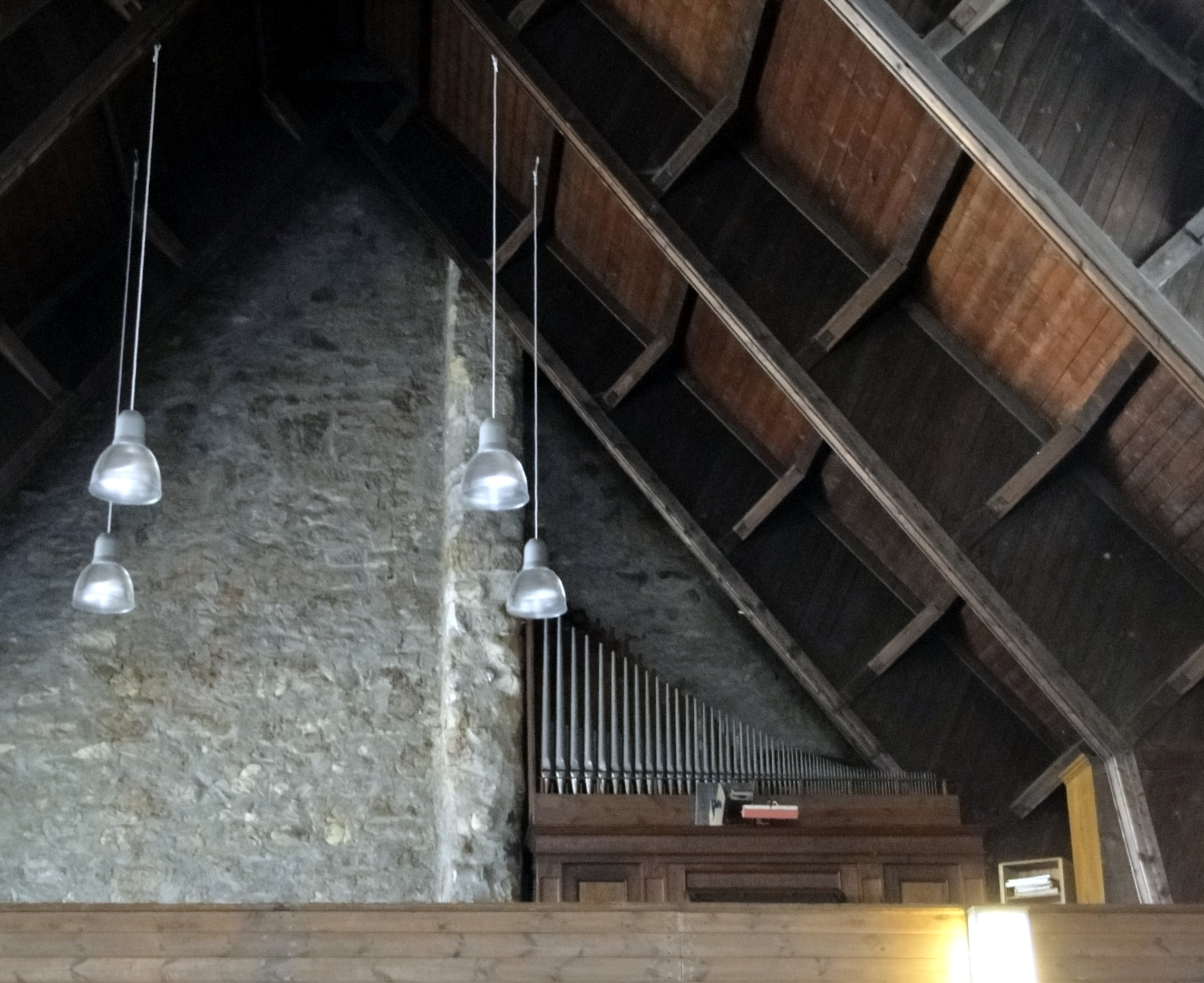 Kreuzbach/Jehmlich-Orgel der Friedenskirche Dresden-Löbtau